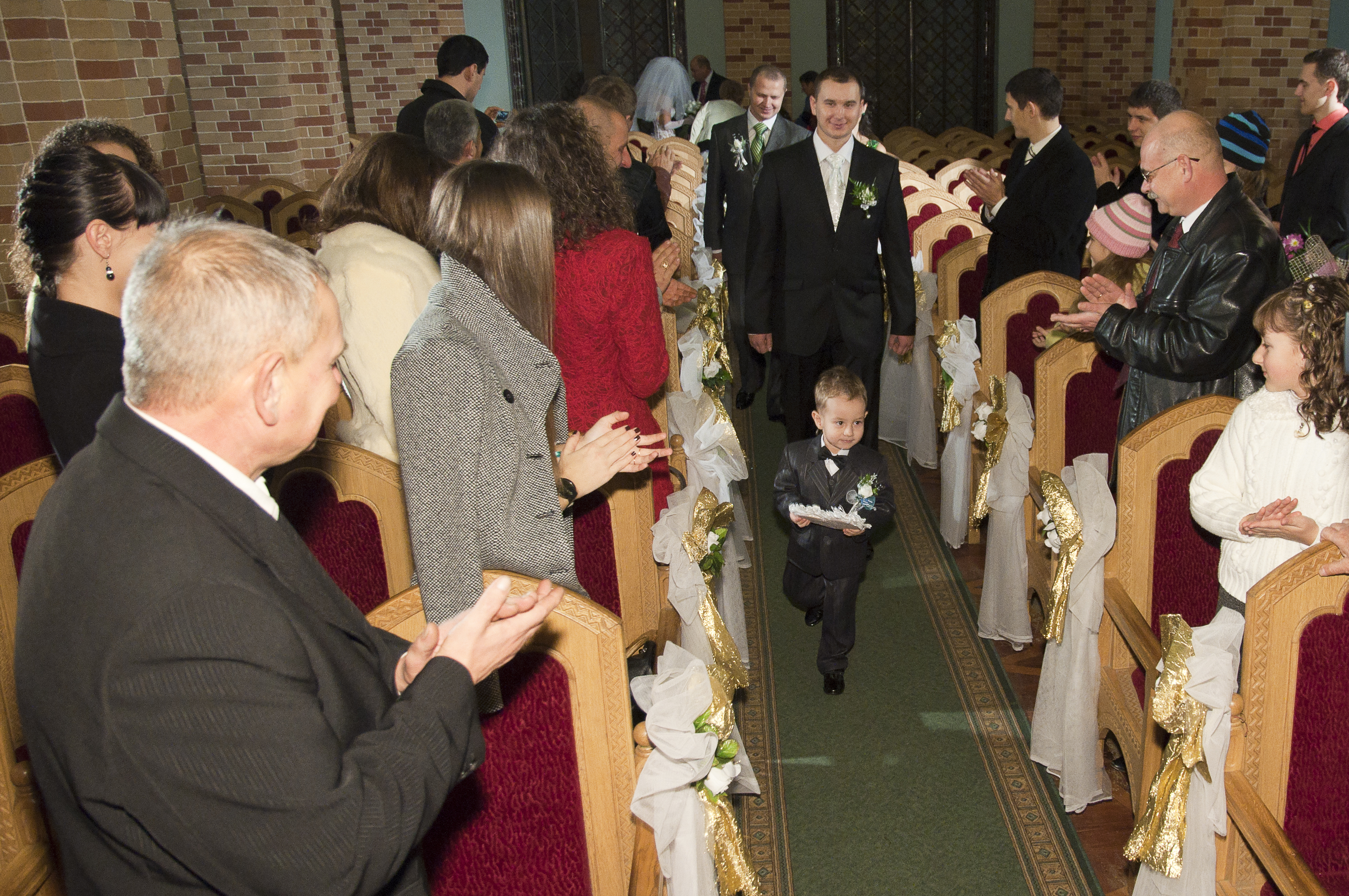 Обряд реєстрації шлюбу в приміщенні Вірменської церкви (Чернівці)